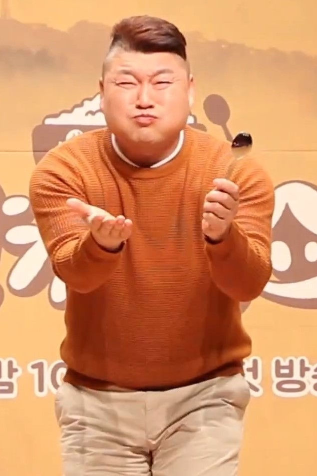 [TV10] 10월 19일 Jtbc 예능 '한끼줍쇼' 제작발표회 현장